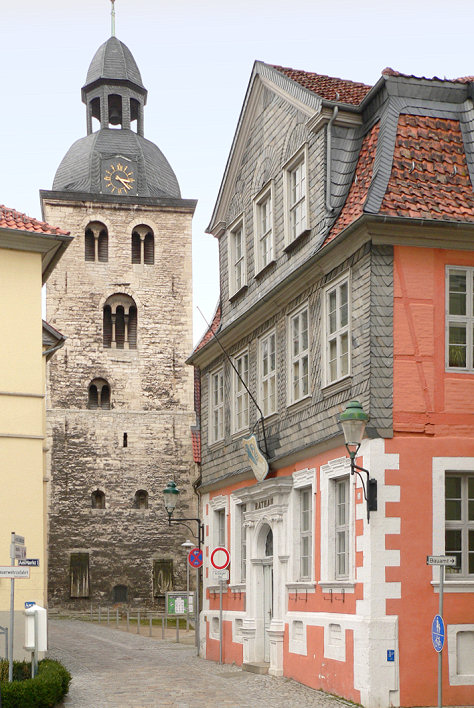 Kirche St. Sebastian Königslutter und Rathaus links und rechts Foto aufgenommen von Benutzer Benutzer:AxelHH, April 2006